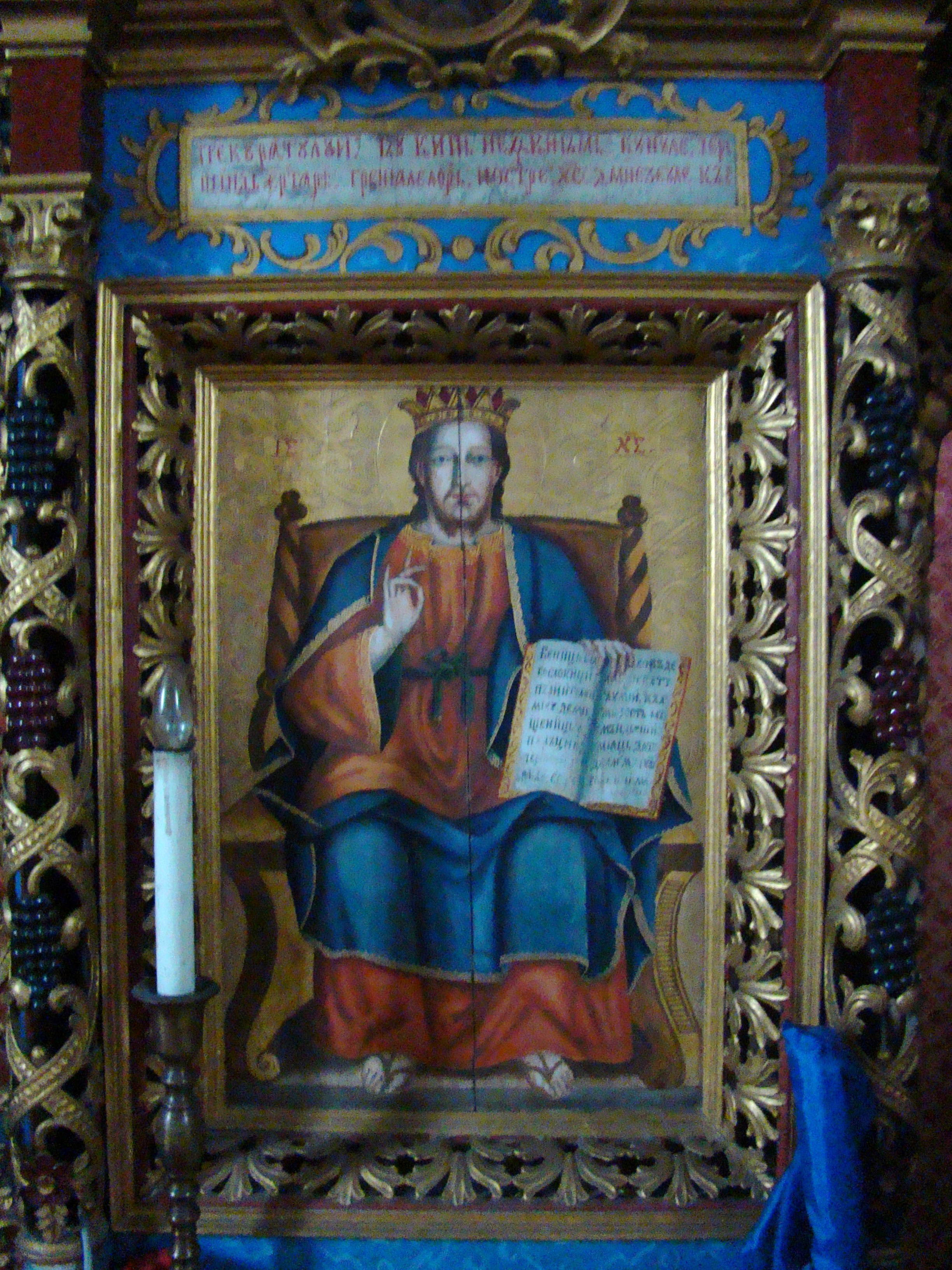 Biserica "Cuvioasa Paraschiva", sat Cetățele; comuna Șișești 01